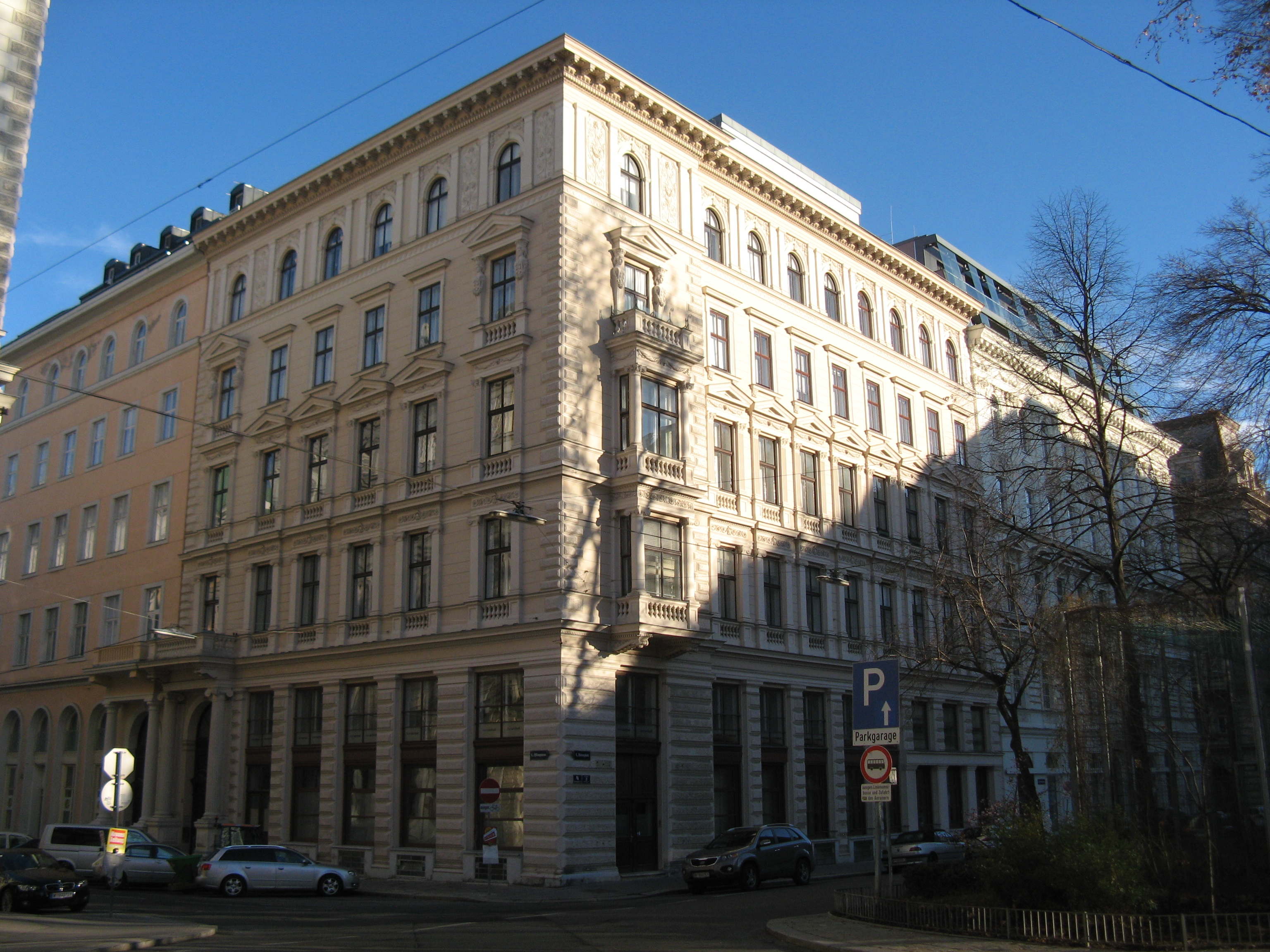 Haus Börseplatz Nr. 4 (1873) von Julius Dörfel, Wien-Innere Stadt